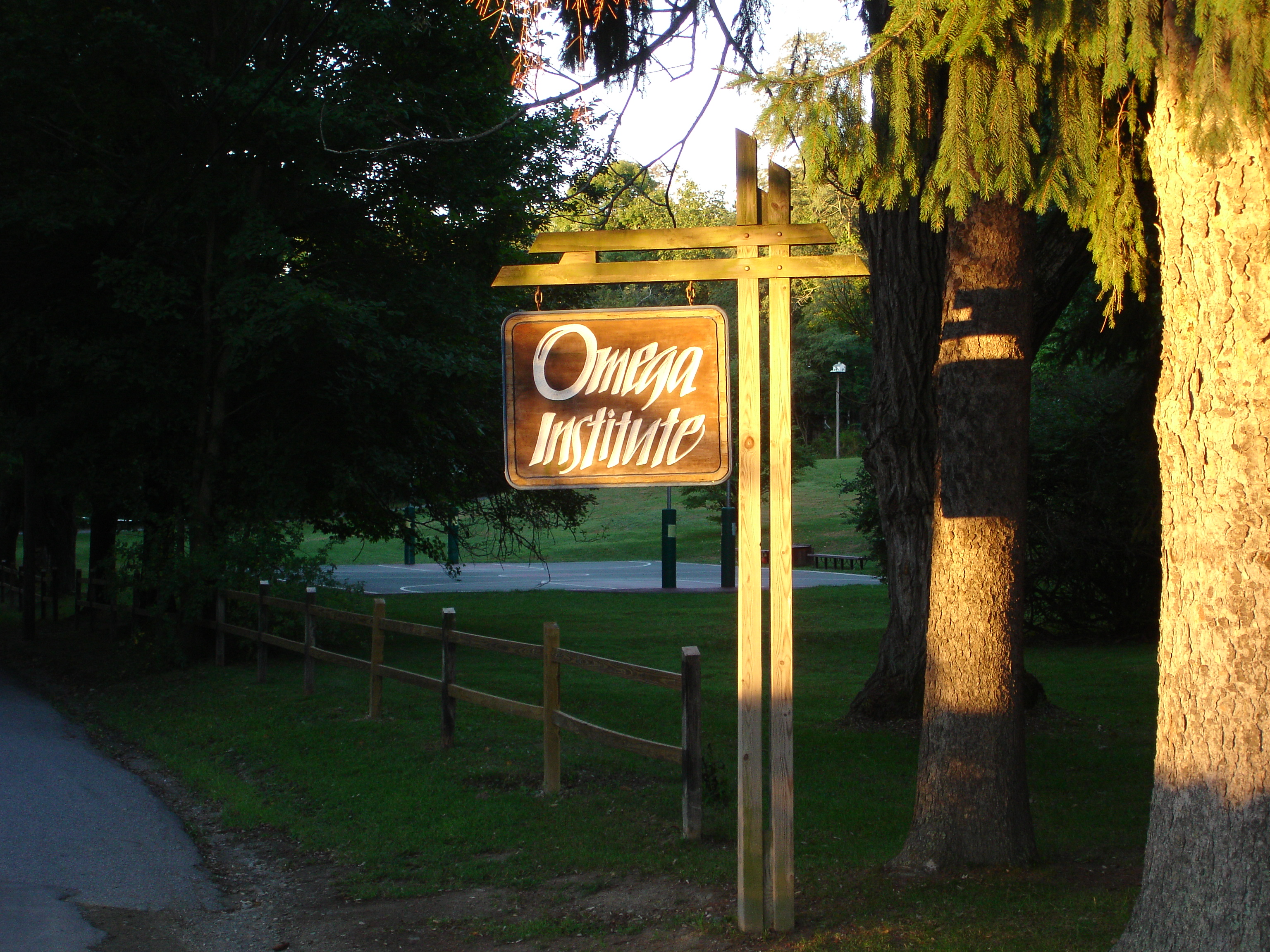 Omega Institute Lake Drive